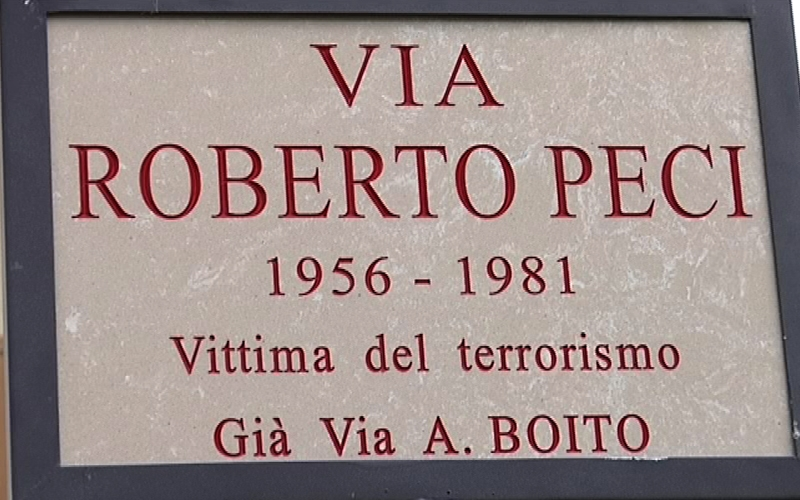 Targa della via intitolata a Roberto Peci. In occasione del trentennale del sequestro e dell'assassinio da parte delle Brigate Rosse, il 9 maggio 2011 è stata intitolata a Roberto Peci la via nota in precedenza come Arrigo Boito (traversa del lungomare sud, in corrispondenza del Palariviera), la strada in cui Peci fu sequestrato il 10 giugno 1981.[1]